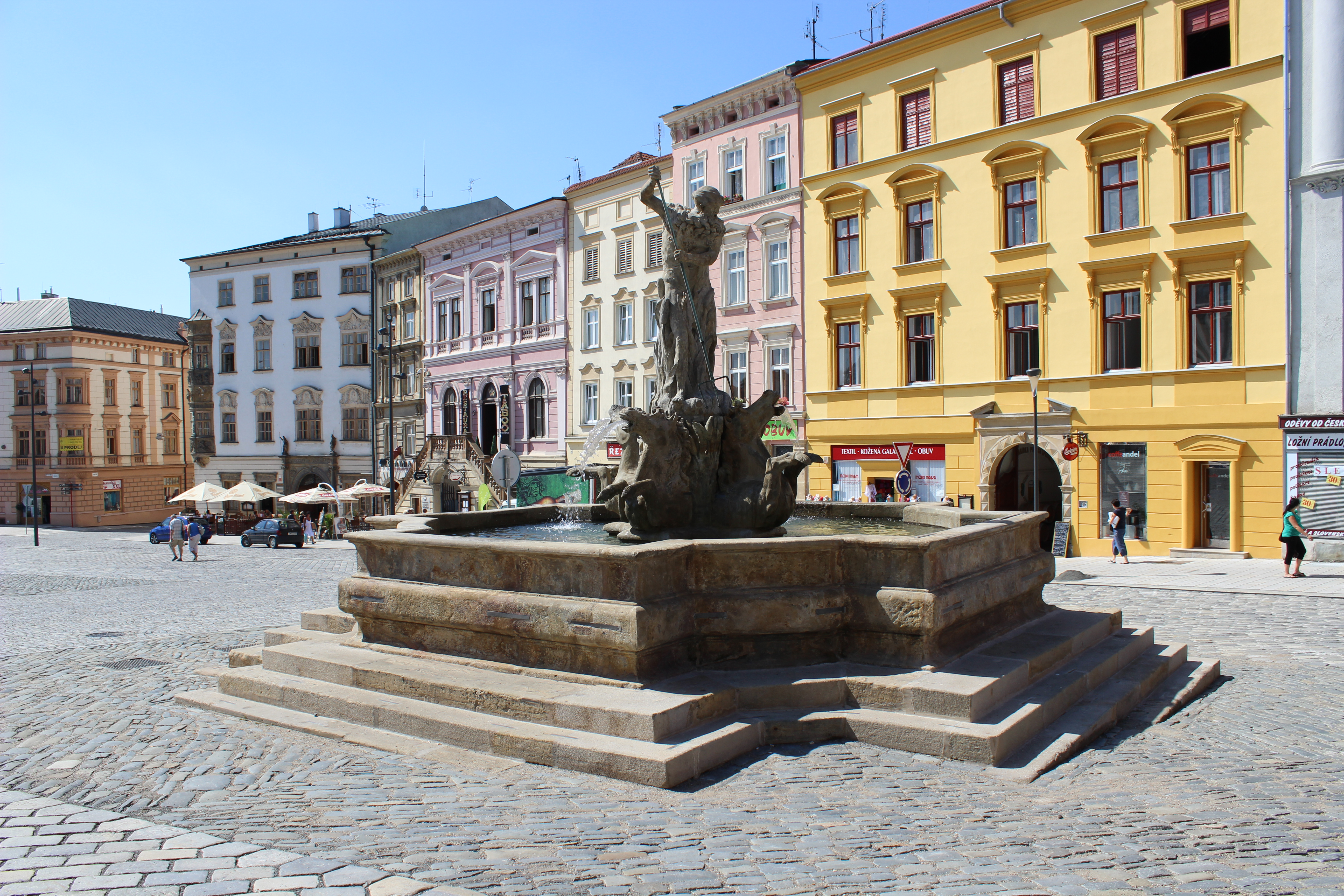 Neptunova kašna na olomouckém Dolním náměstí (pohled od severu).